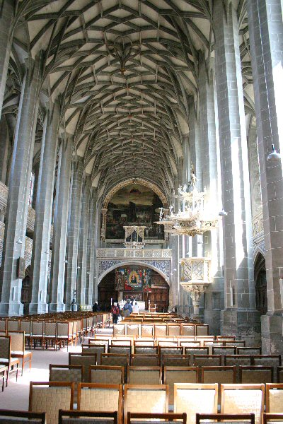 Halle (Saale), Marktkirche, eigenes Foto von 2005, public domain, Mewes 08:01, 24. Apr 2005 (CEST)